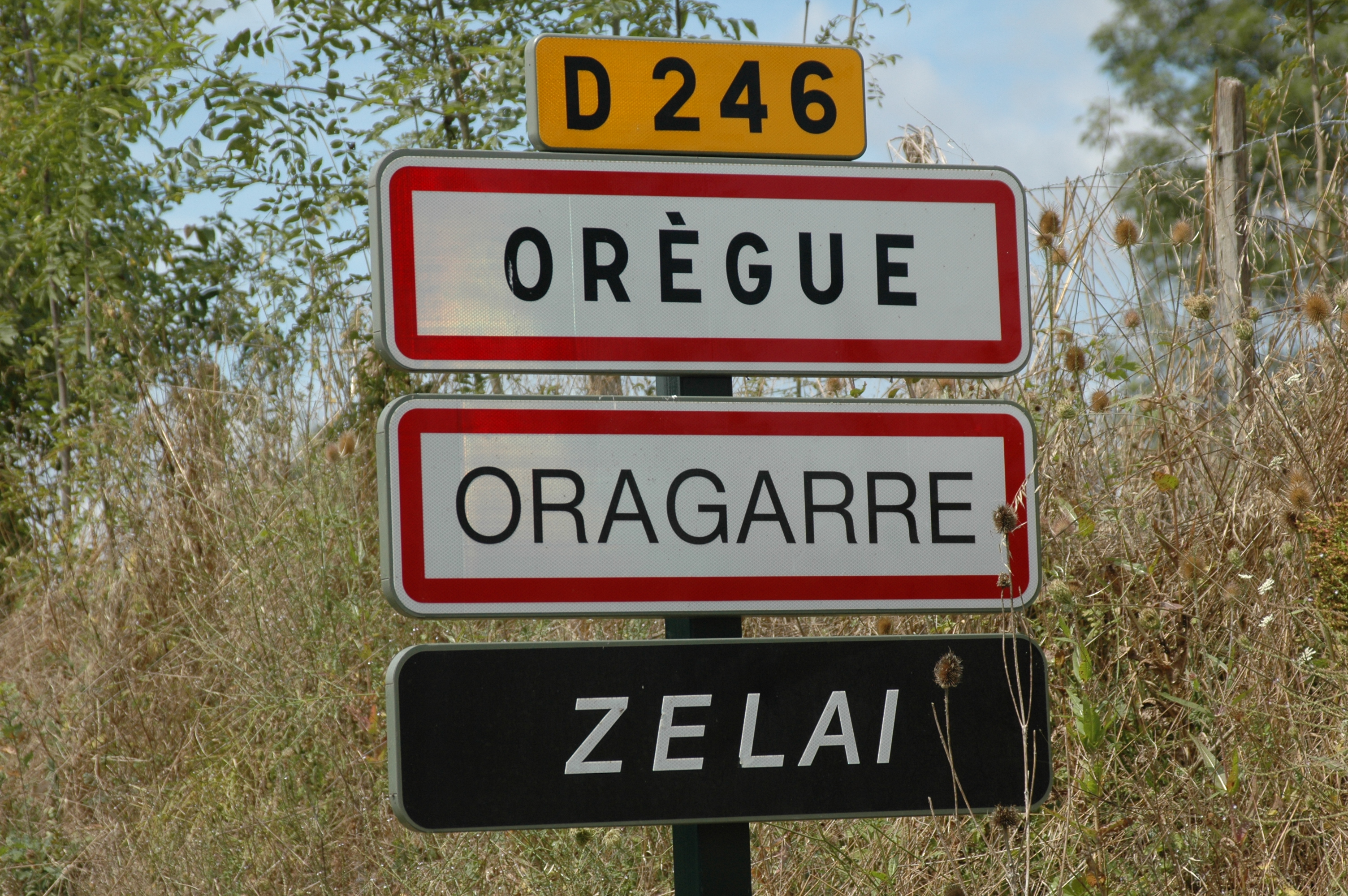 Panneau sur la D246, à l'entrée d'Orègue